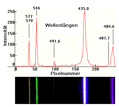 Spektrum von Quecksilberdampf